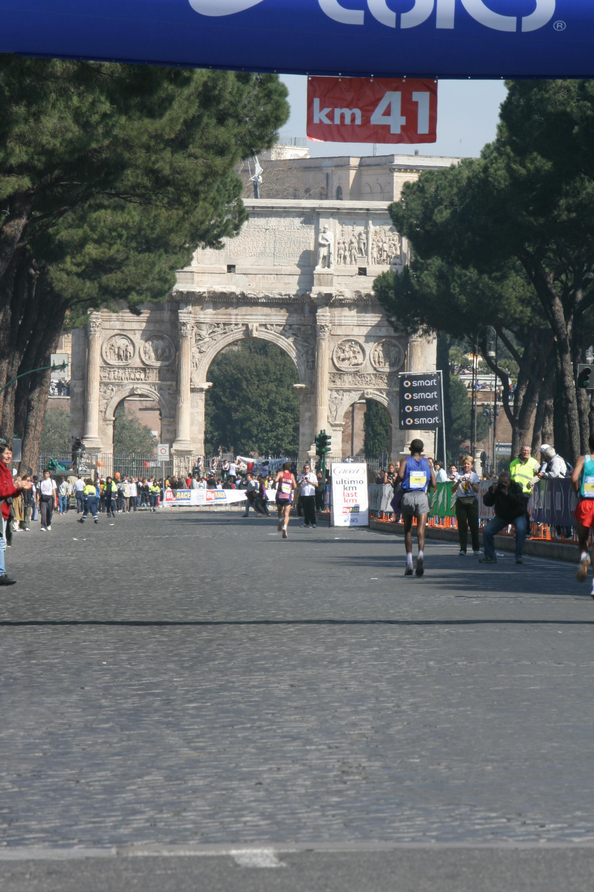 XII edizione della Maratona di Roma, 26 marzo 2006